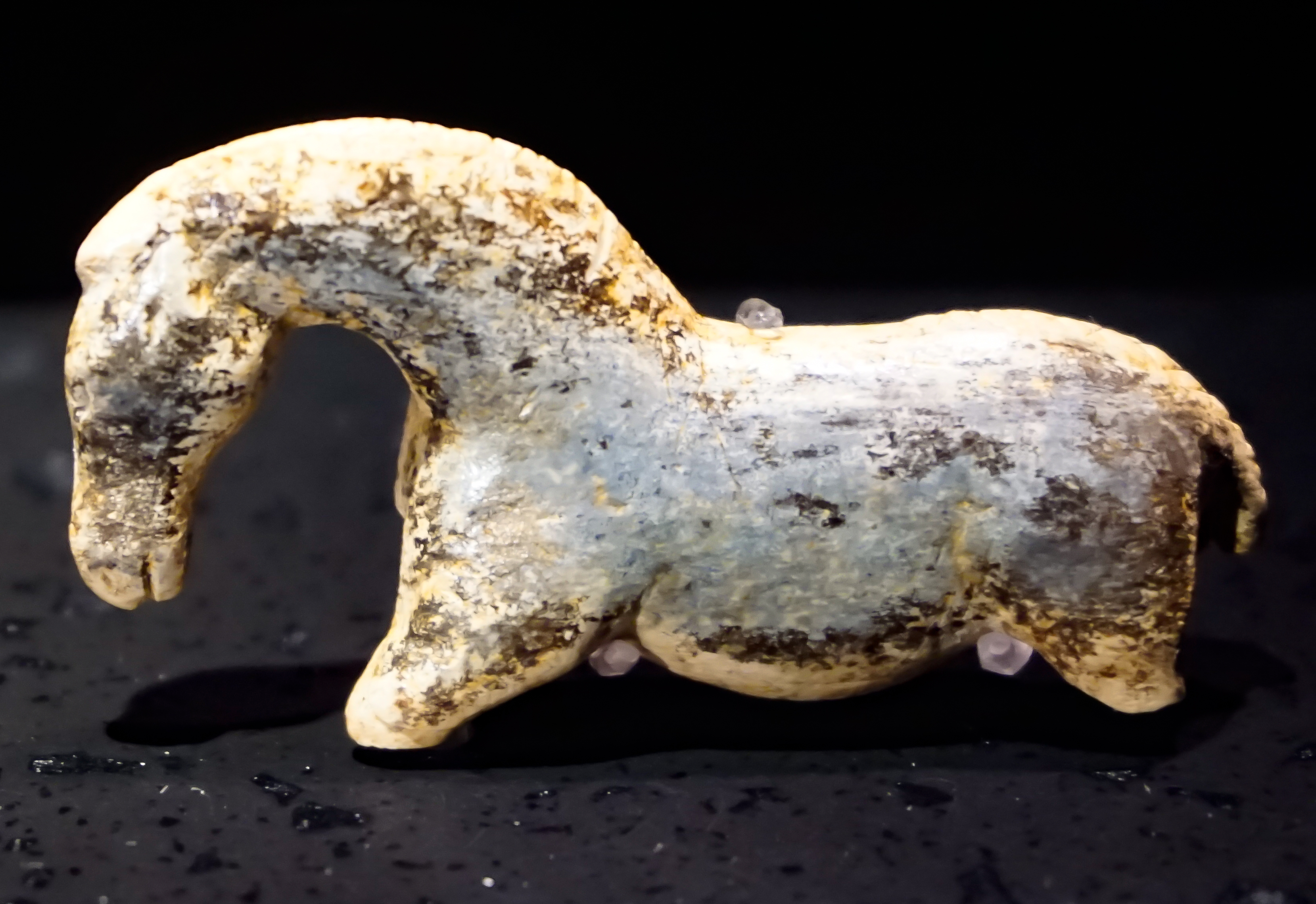 MUT: Museum der Universität Tübingen - Alte Kulturen - Sammlungen im Schloss Hohentübingen: Sammlung der Älteren Urgeschichte des Museums der Universität Tübingen - Tierplastik aus Mamutelfenbein, Vogelherdhöhle, etwa 40.000 Jahre alt